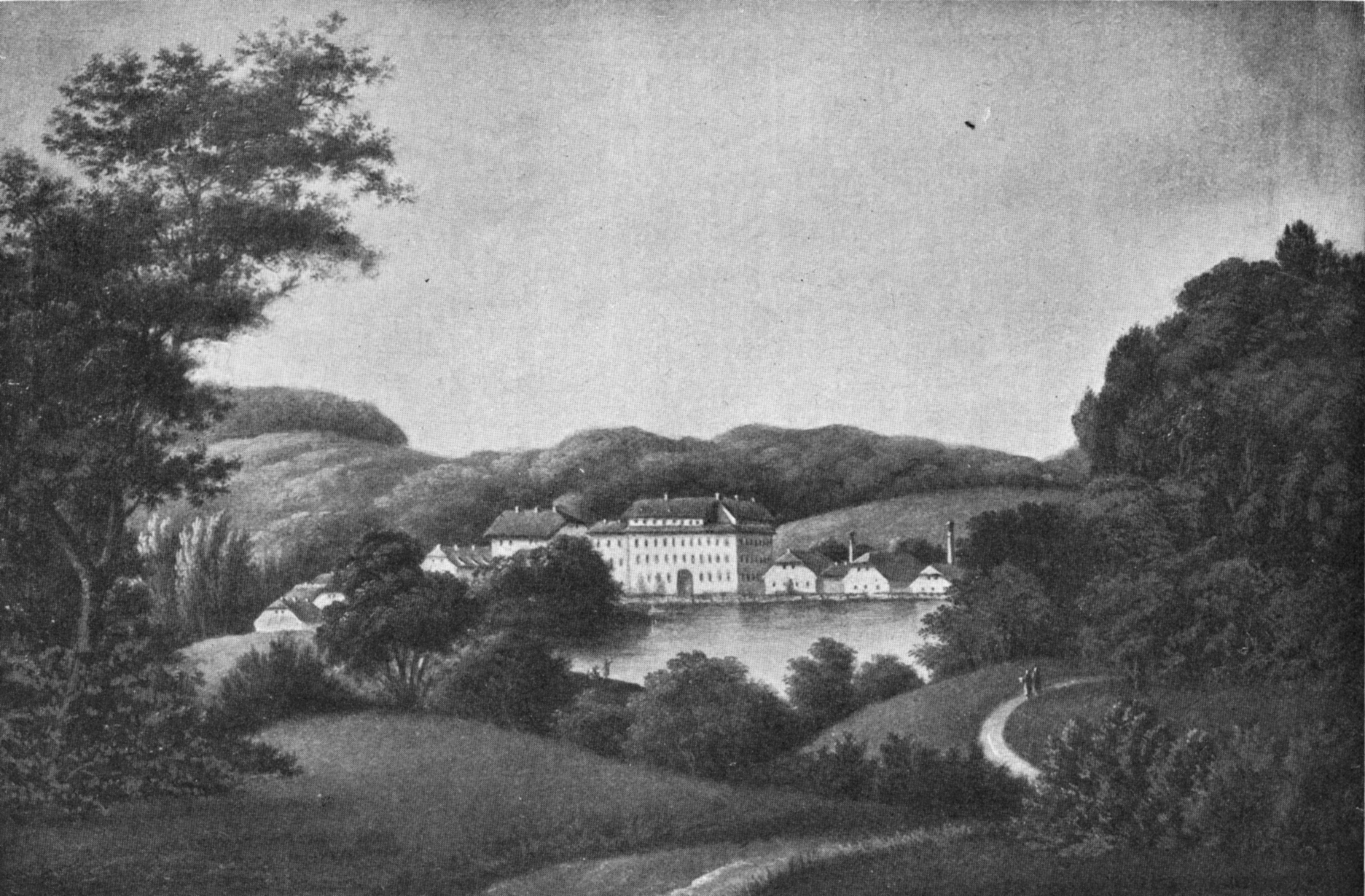 Brede Hovedbygning ligger i dag som en del af det anlæg, der indtil 1831 udgjorde Brede Kobber- og Messingværk og siden da Brede Klædefabrik i Kongens Lyngby nord for København.